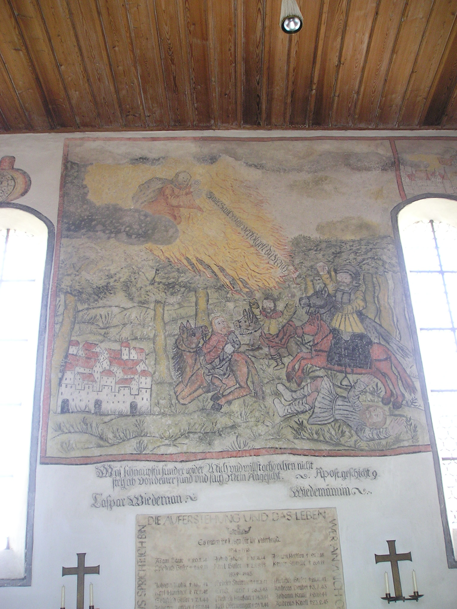 Bühl i. Ries, Gemeindeteil von Alerheim im Landkreis Donau-Ries (Bayern), Evang. St.-Marien-Kirche, Saulus-Fresko (Langhaus-Südwand)